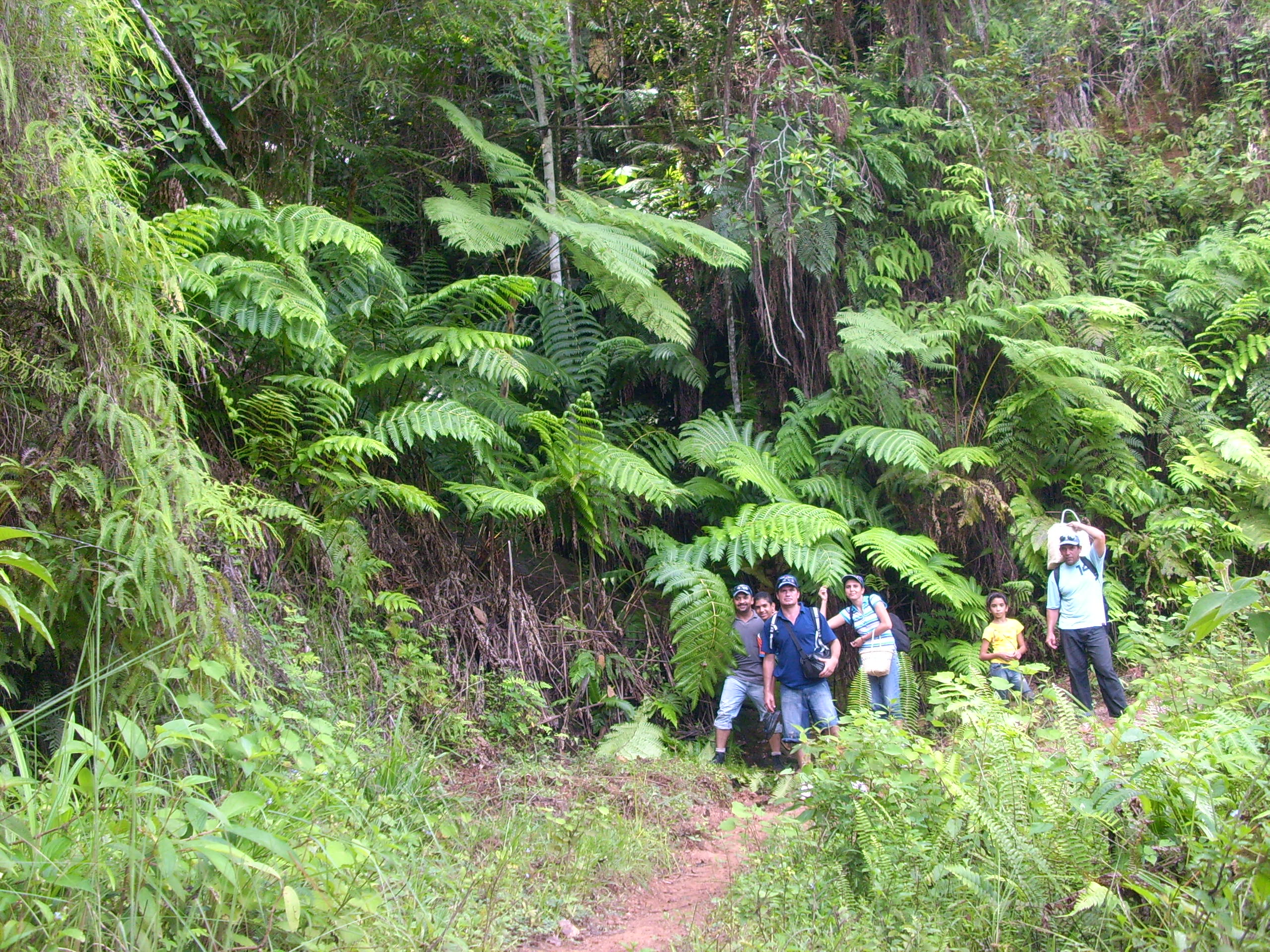 Estos helechos arborescentes crecen en las regiones montañosas de Cuba, esta instantánea fue tomada en la “Sierra Maestra” en el municipio Buey Arriba, Provincia Granma: Compárese su tamaño tomando como patrón a las personas en la imagen.